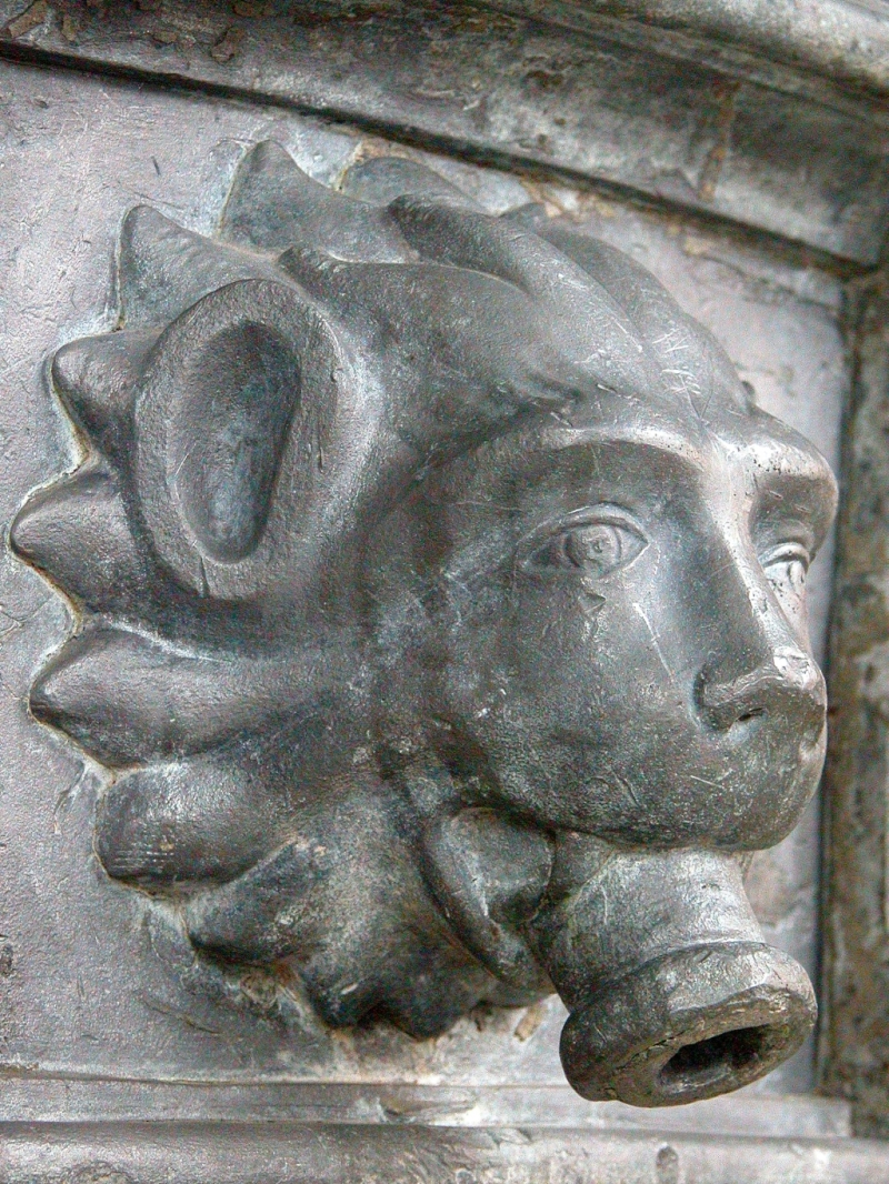 Braunschweig: Löwenkopf als Wasserspeier auf der unterste Originalschale des Marienbrunnens im Städtischen Museum im Altstadtrathaus. Braunschweig, Germany: A lion’s head as a gargoyle on the lowest original bassin of St. Mary’s Fountain in the Municipal Museum in the Old Town Town hall.